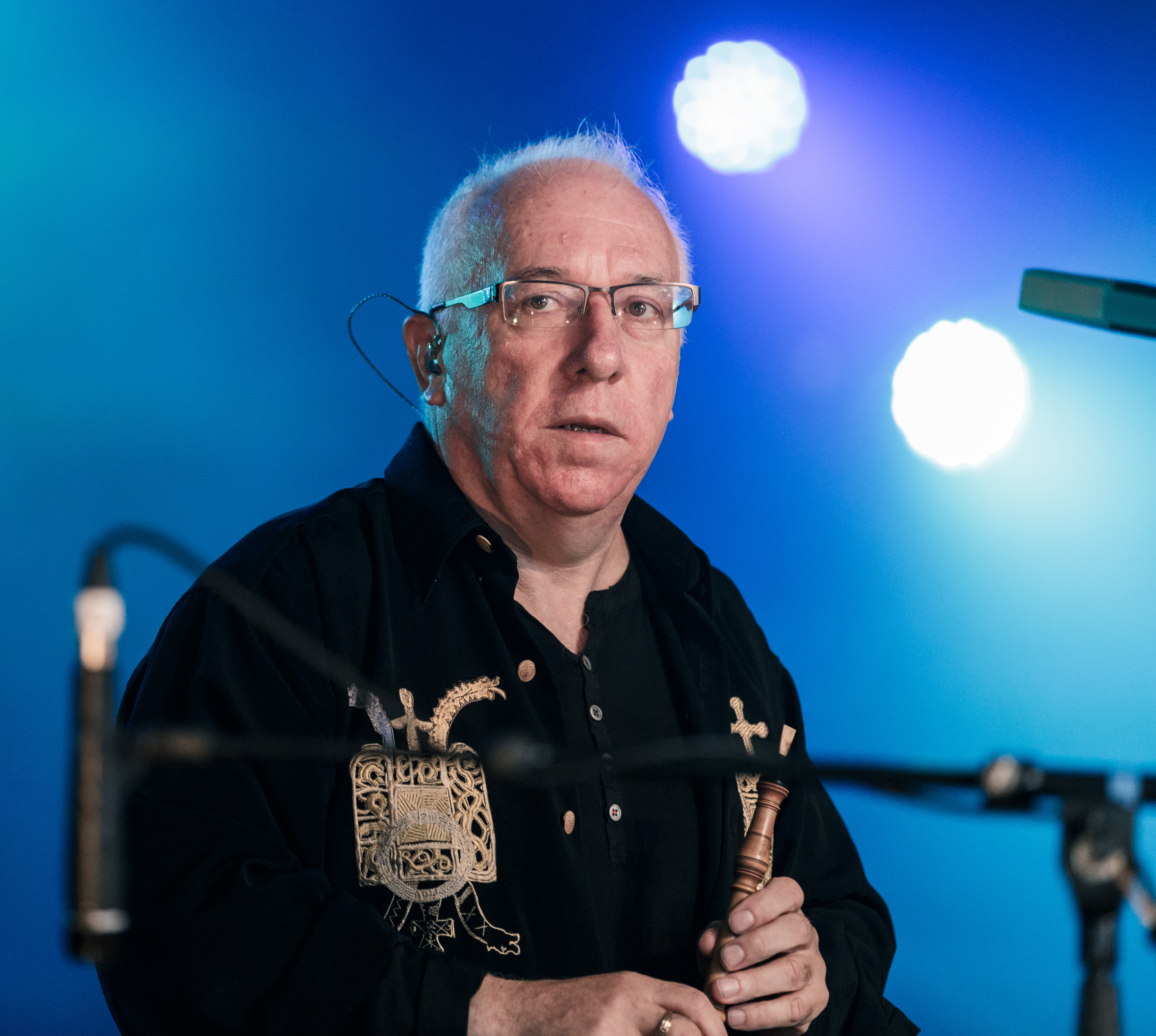 Pascal Lamour en concert lors du festival de Cornouaille place St-Corentin à Quimper le 21 juillet 2017 - version recadrée.